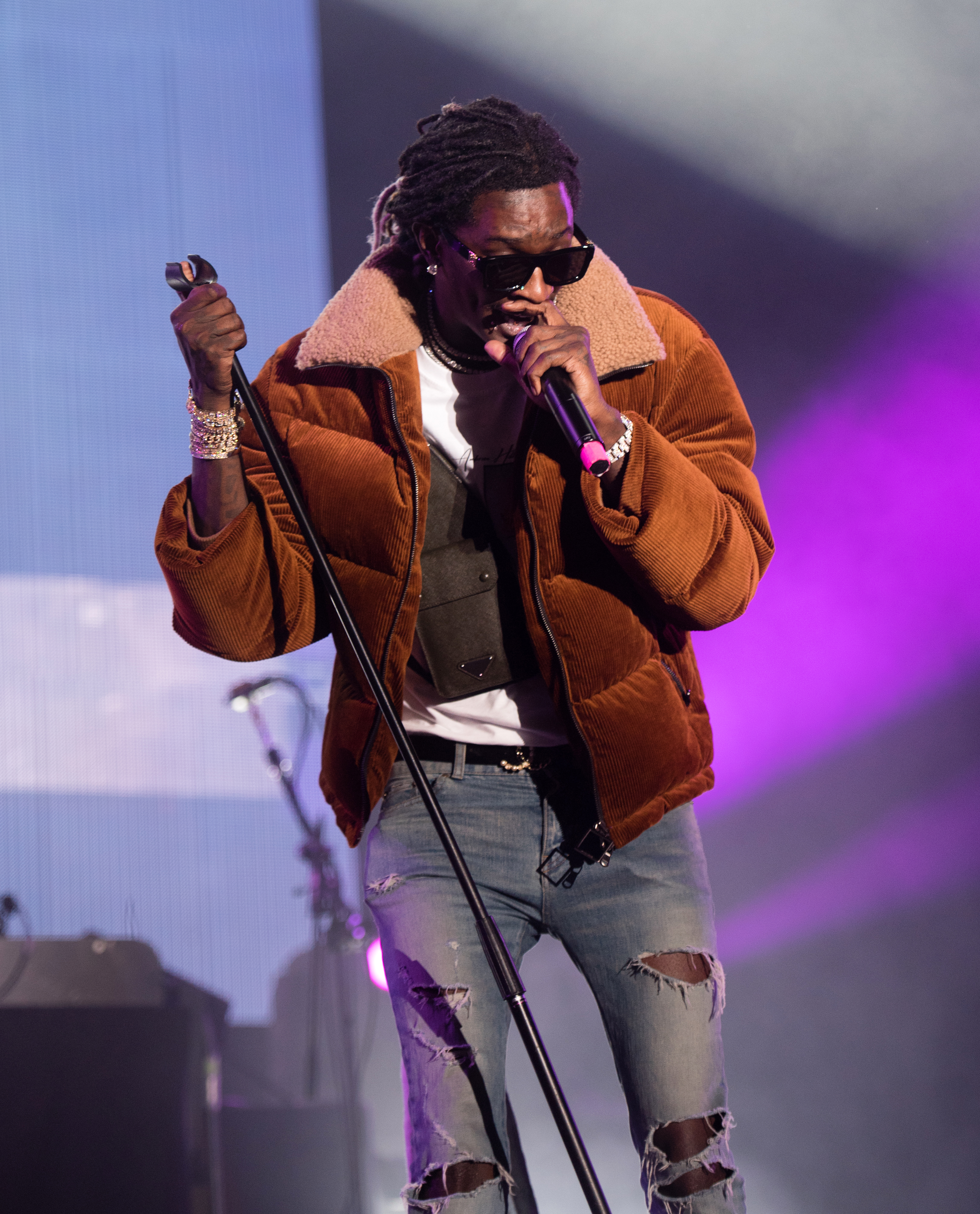 Young Thug live auf dem Openair Frauenfeld 2019